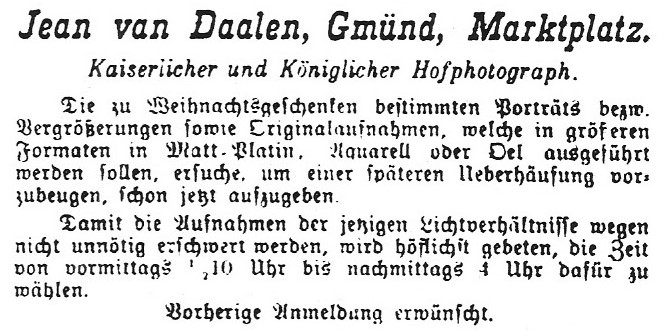 Anzeige Jean van Daalens in der »Remszeitung« vom November 1898.